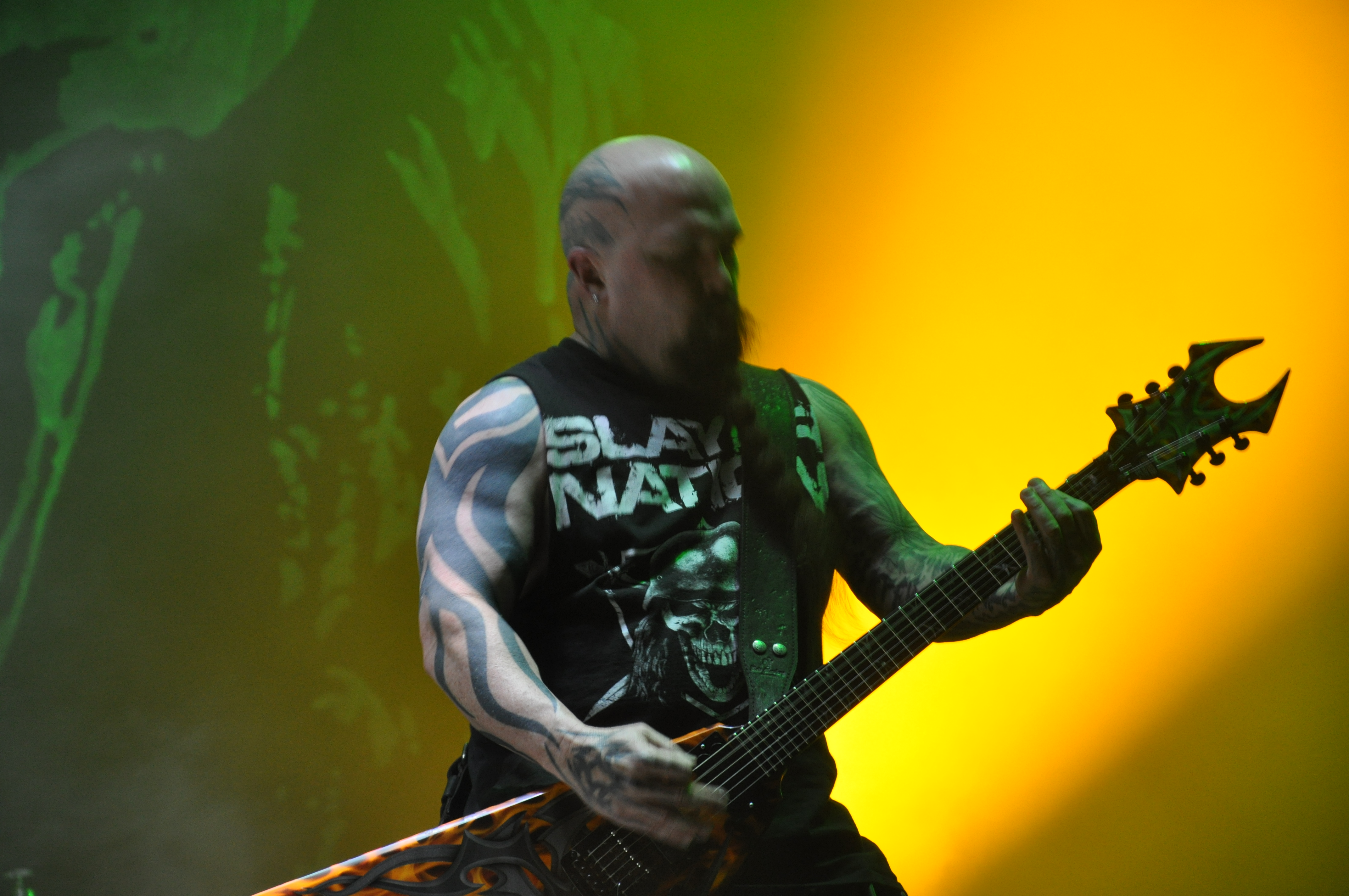 Slayer auf der Alternastage bei Rock am Ring 2014